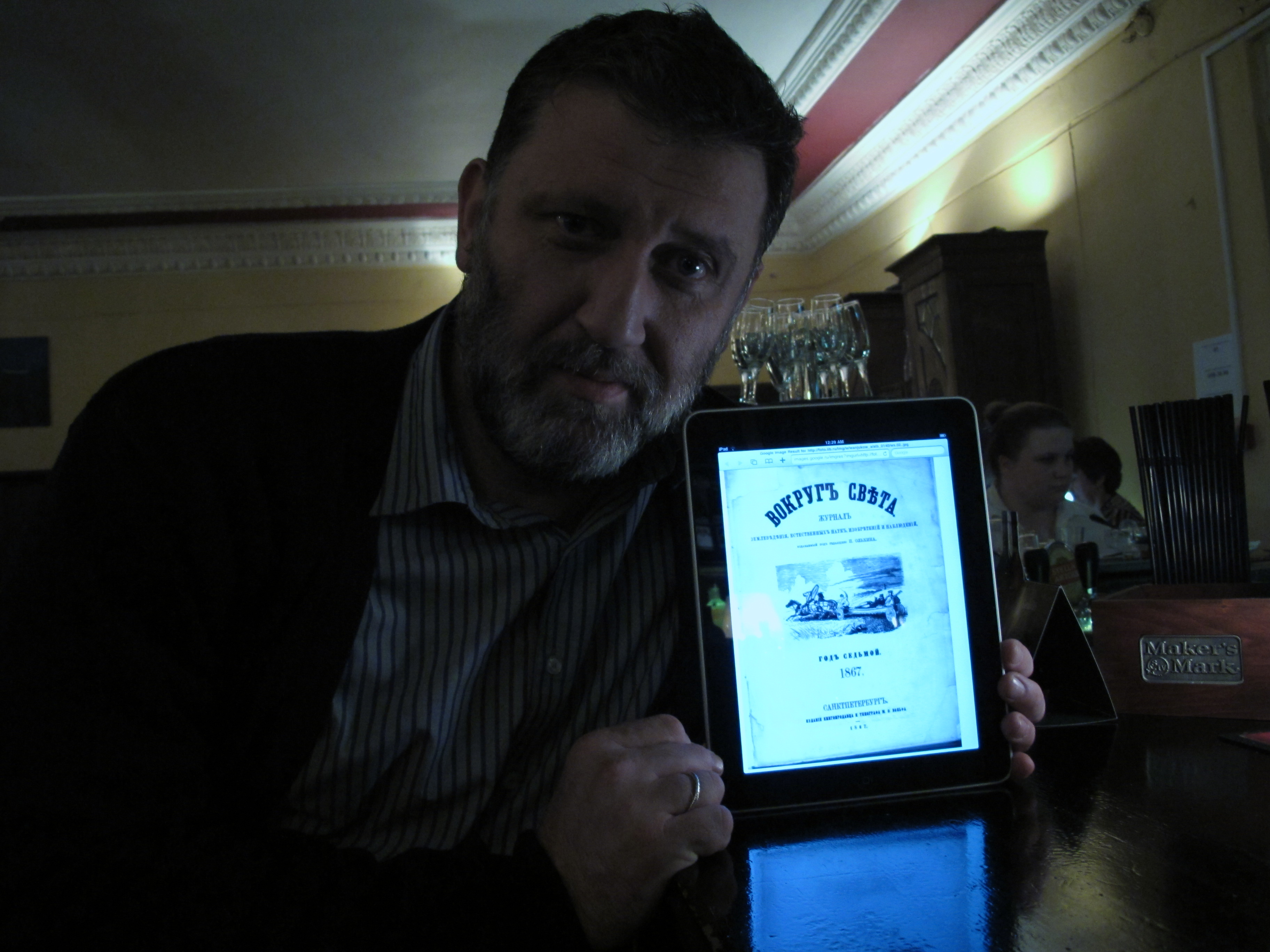 Пархоменко